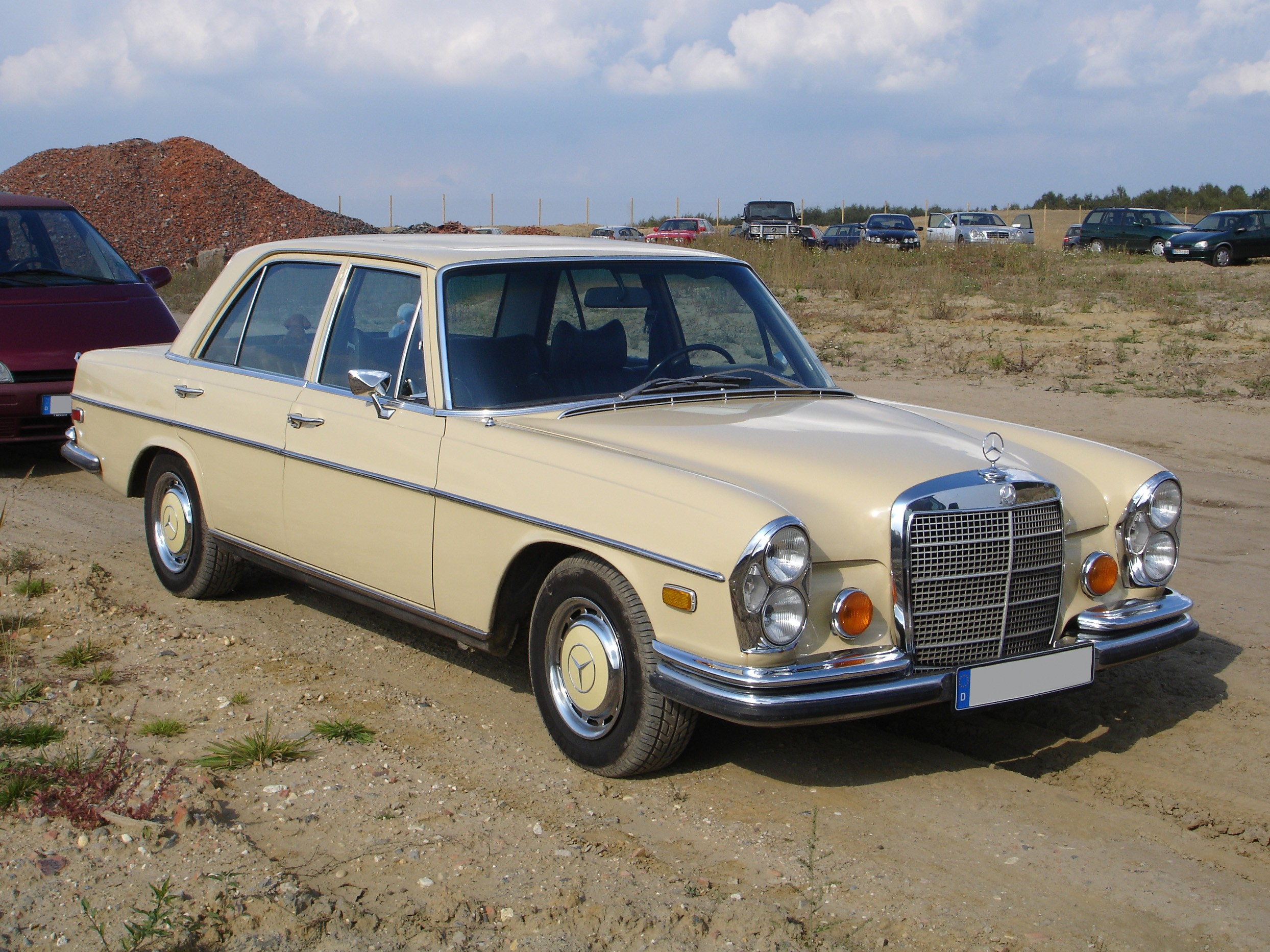 Mercedes 280S (W108) Limousine US-Version